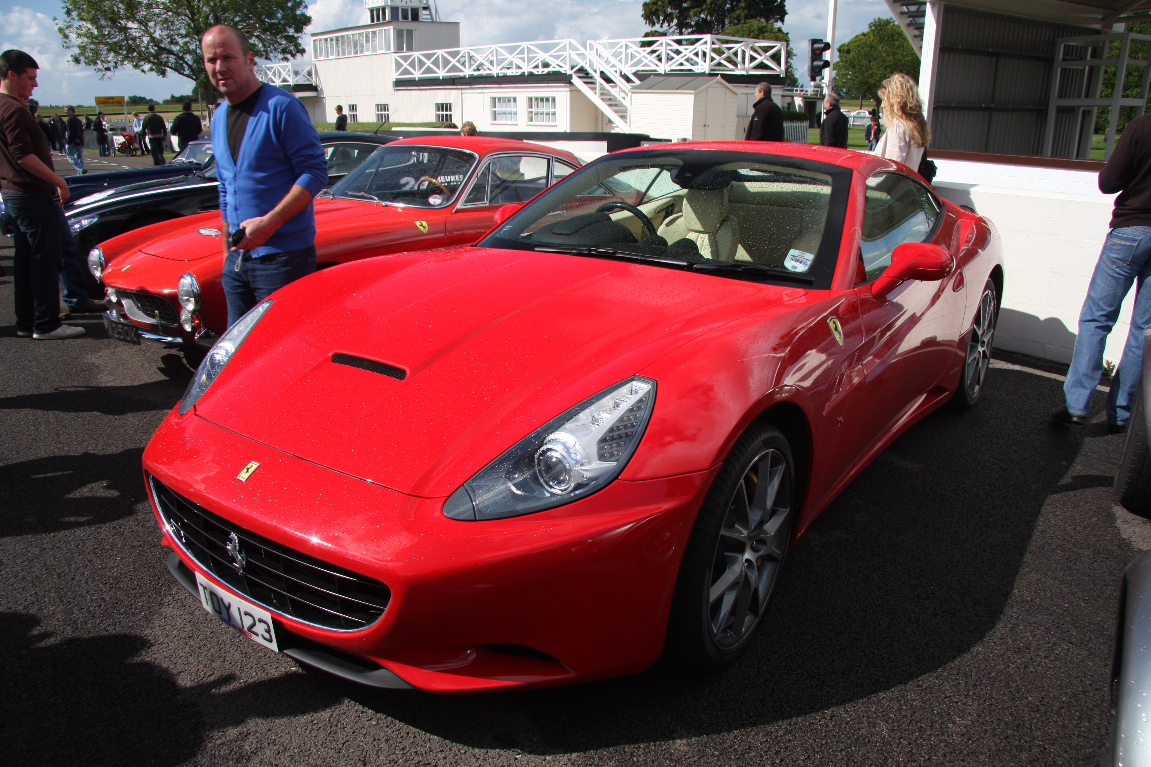 Ferrari California